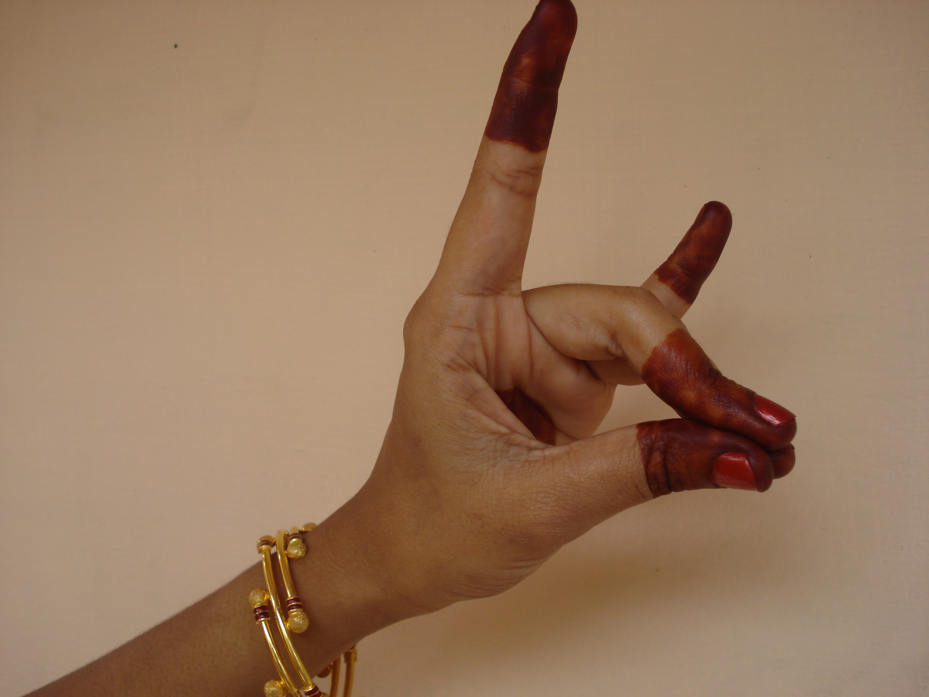 സിംഹ മുഖഹസ്തം